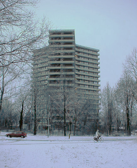 Studentenflat Asserpark te Wageningen in de sneeuw.